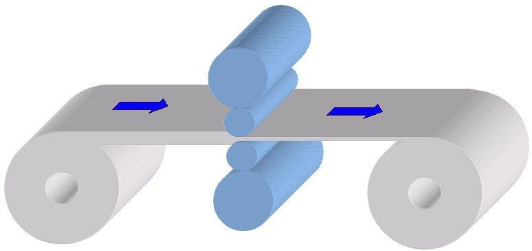 Représentation laminage pour article Fabrication Feuilles et Bandes d'Aluminium. Image créée par Wikifab, libre de droits.